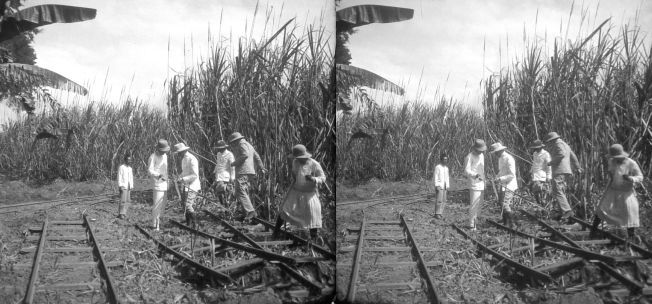 Negatief. Onderzoek van ziek riet door de administrateur, groepsadviseur Dr. Koningsberger, mevrouw Neeb en een werknemer, Afd. Glagah der S.F. Soekowidi